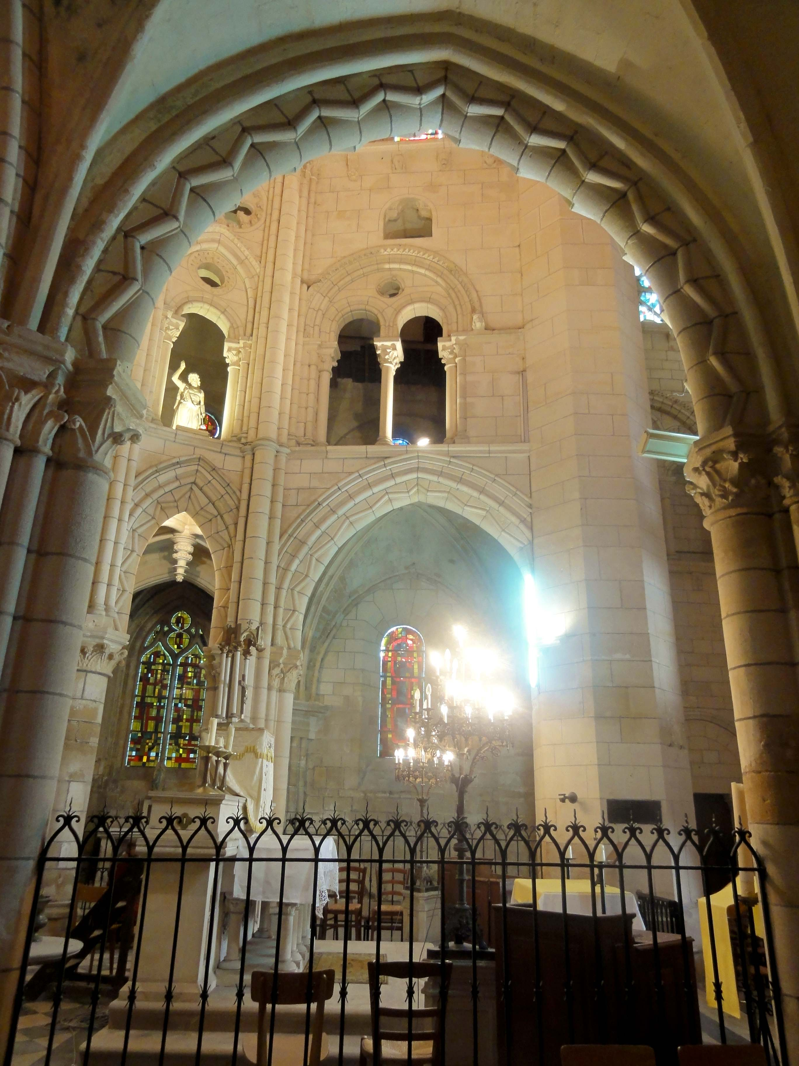 Déambulatoire, vue par la première grande arcade du nord.